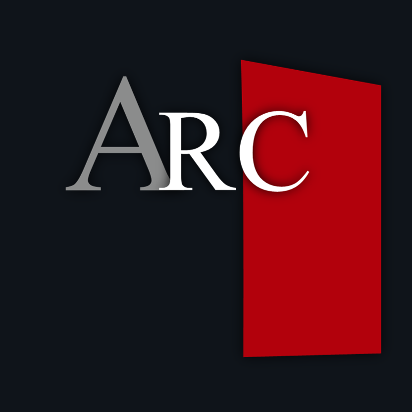 Logo officiel avec fond gris de l'Athénée Robert Catteau de la Ville de Bruxelles.